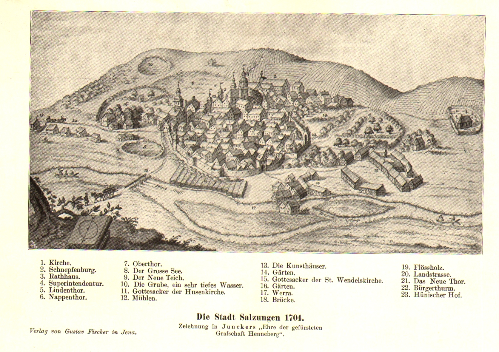 Stadtansicht von Salzungen aus dem Jahr 1704, enthalten in Junkers "Ehre der gefürsteten Grafschaft Henneberg"